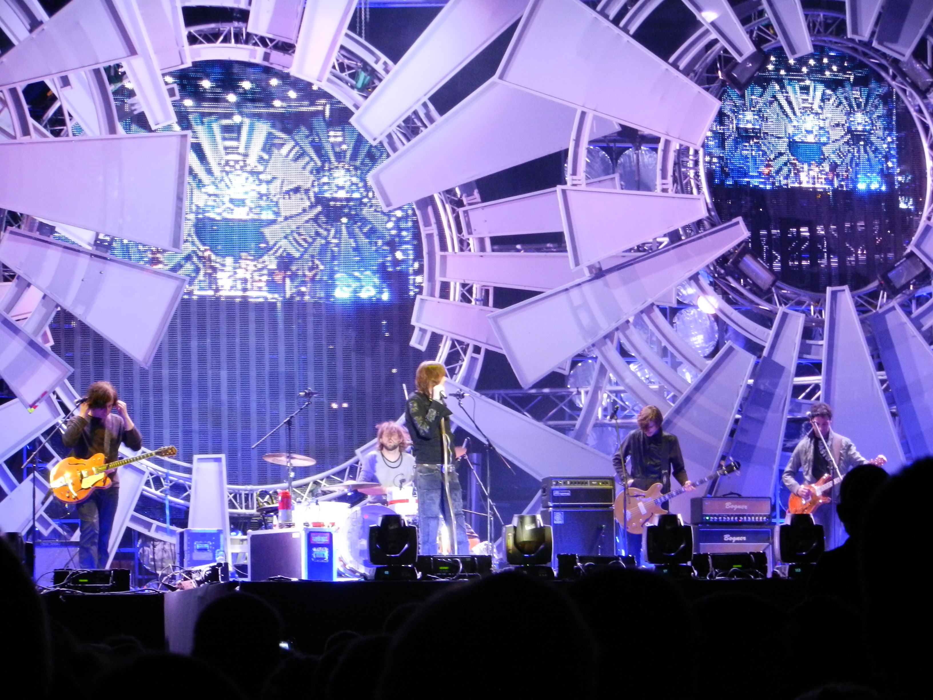 Wilki podczas koncertu "Wianki nad Wisłą 2011", Podzamcze, Warszawa 25.06.2011.